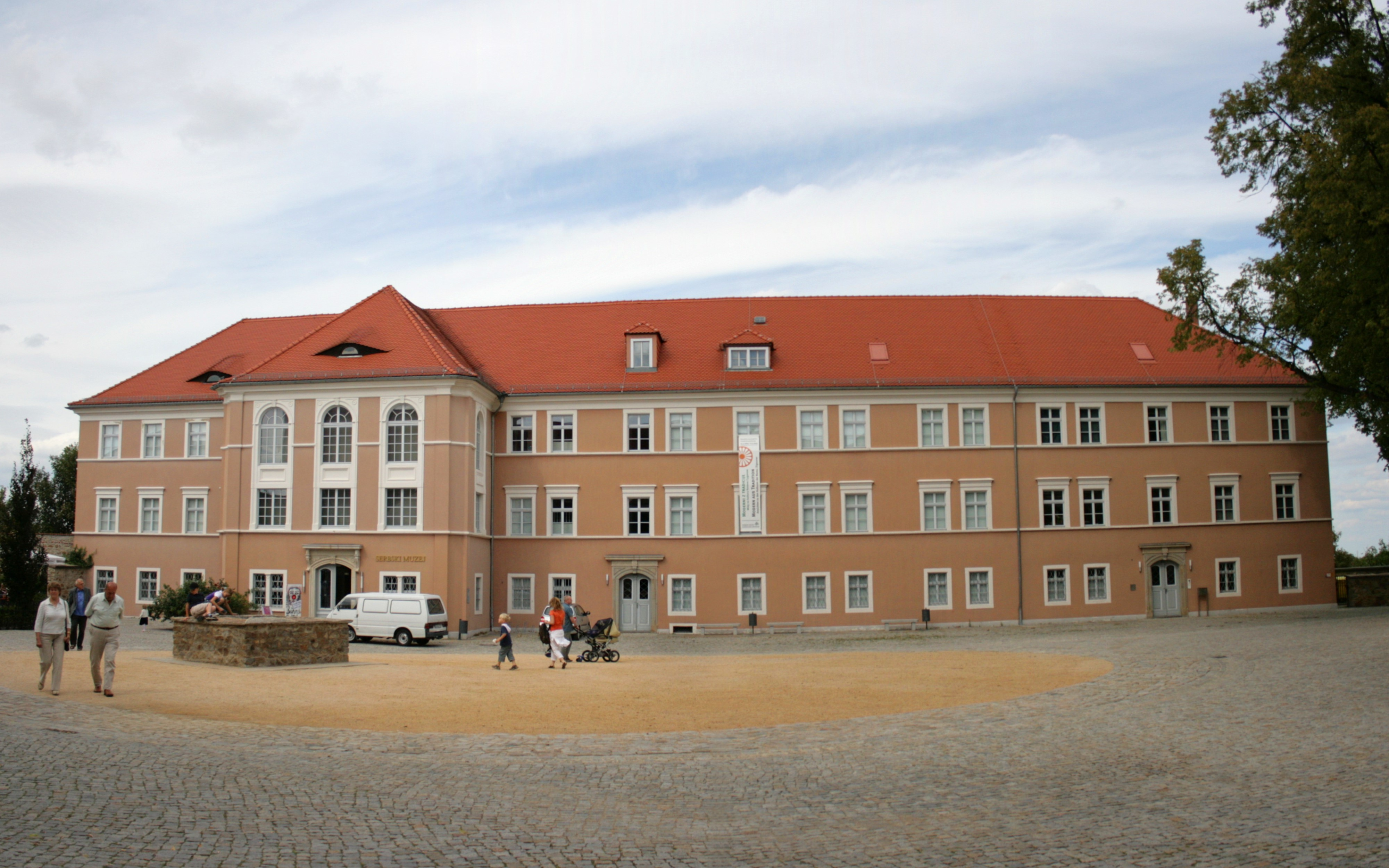 Sorbisches Museum auf der Ortenburg in Bautzen